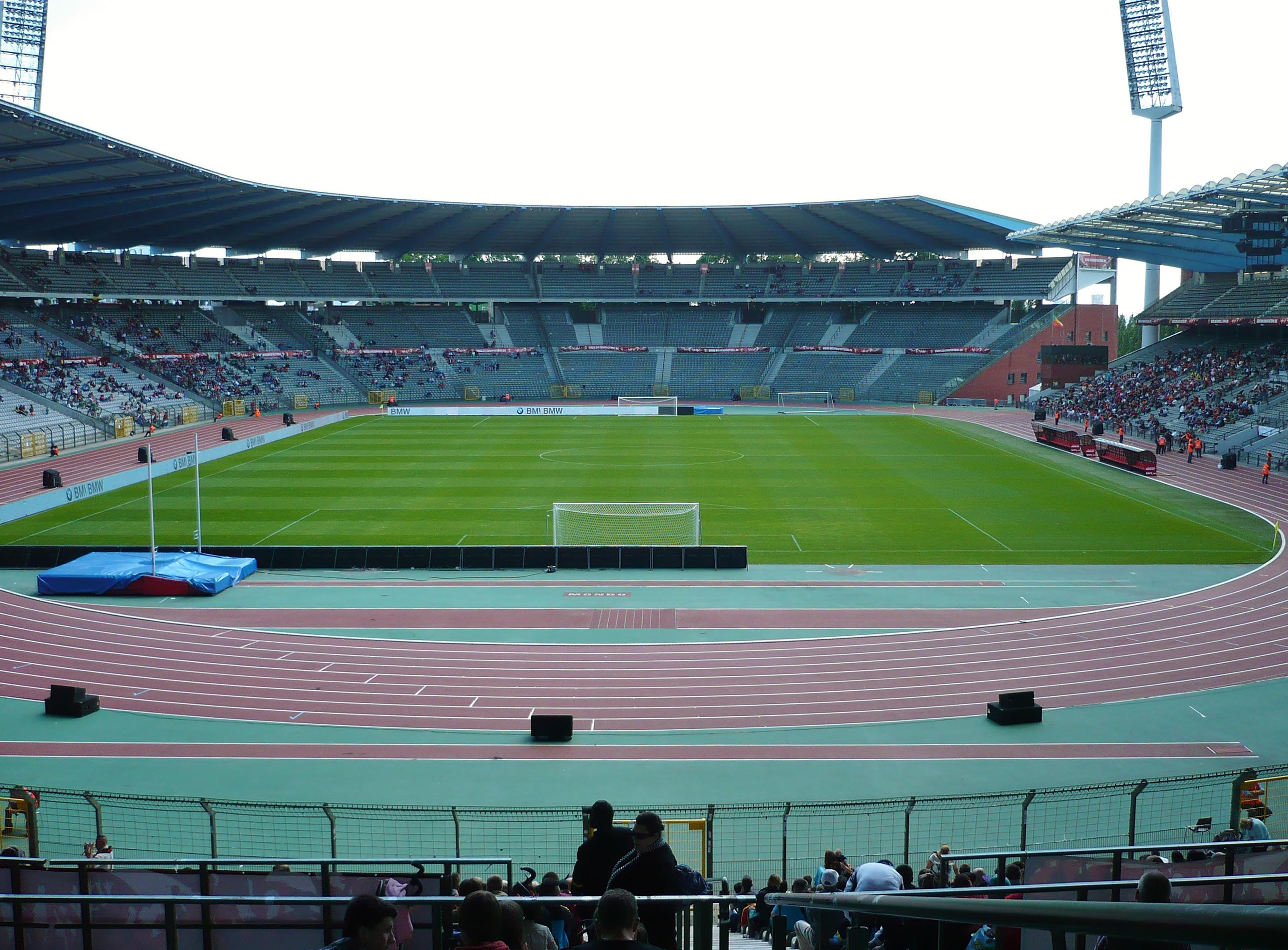 Vue du Stade Roi Baudouin de l'intérieur